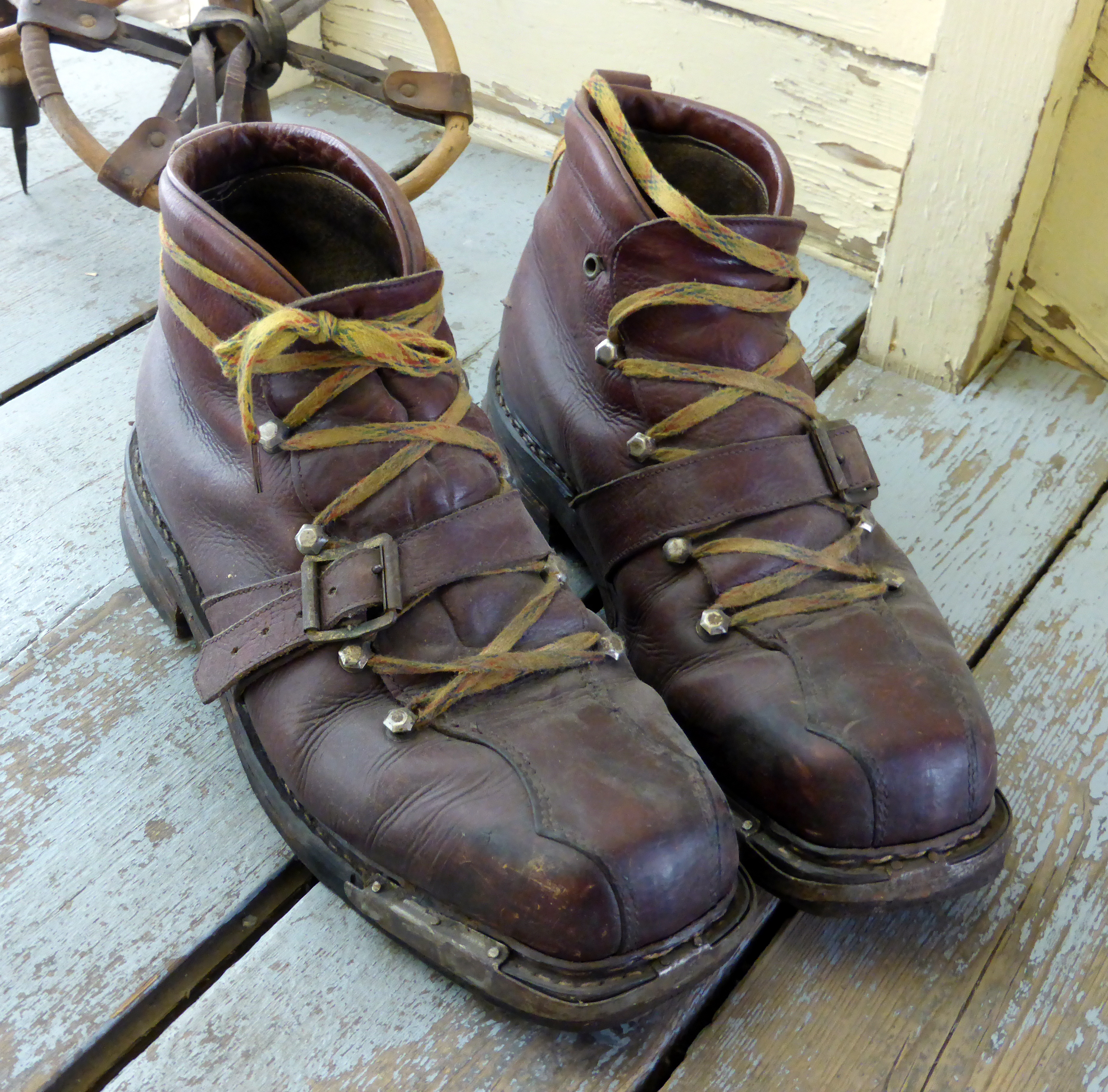 Historische Skischuhe frühes 20. Jahrhundert. Ausgestellt im Museum sächsisch-böhmisches Erzgebirge in Marienberg.